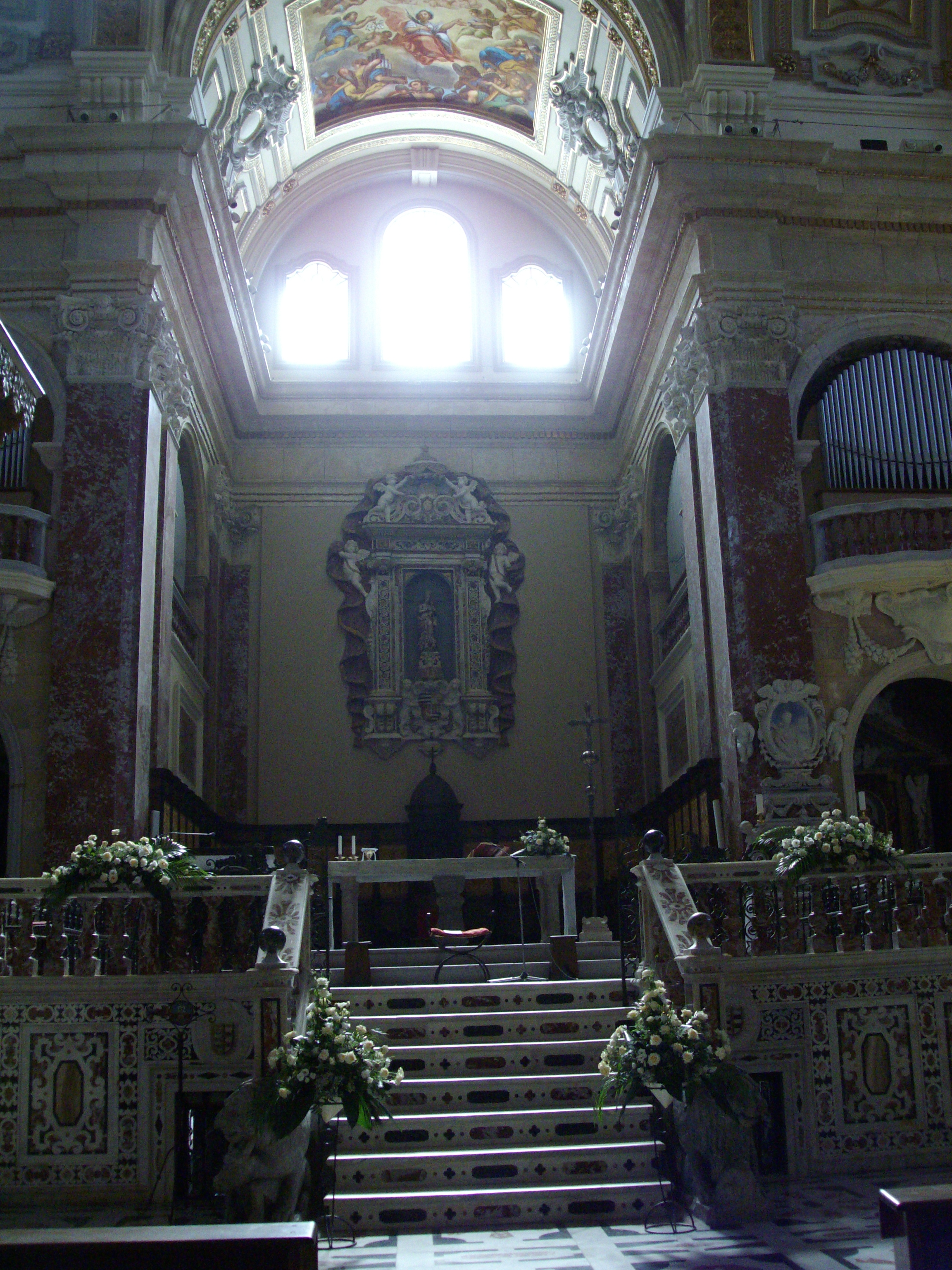 Duomo di Cagliari